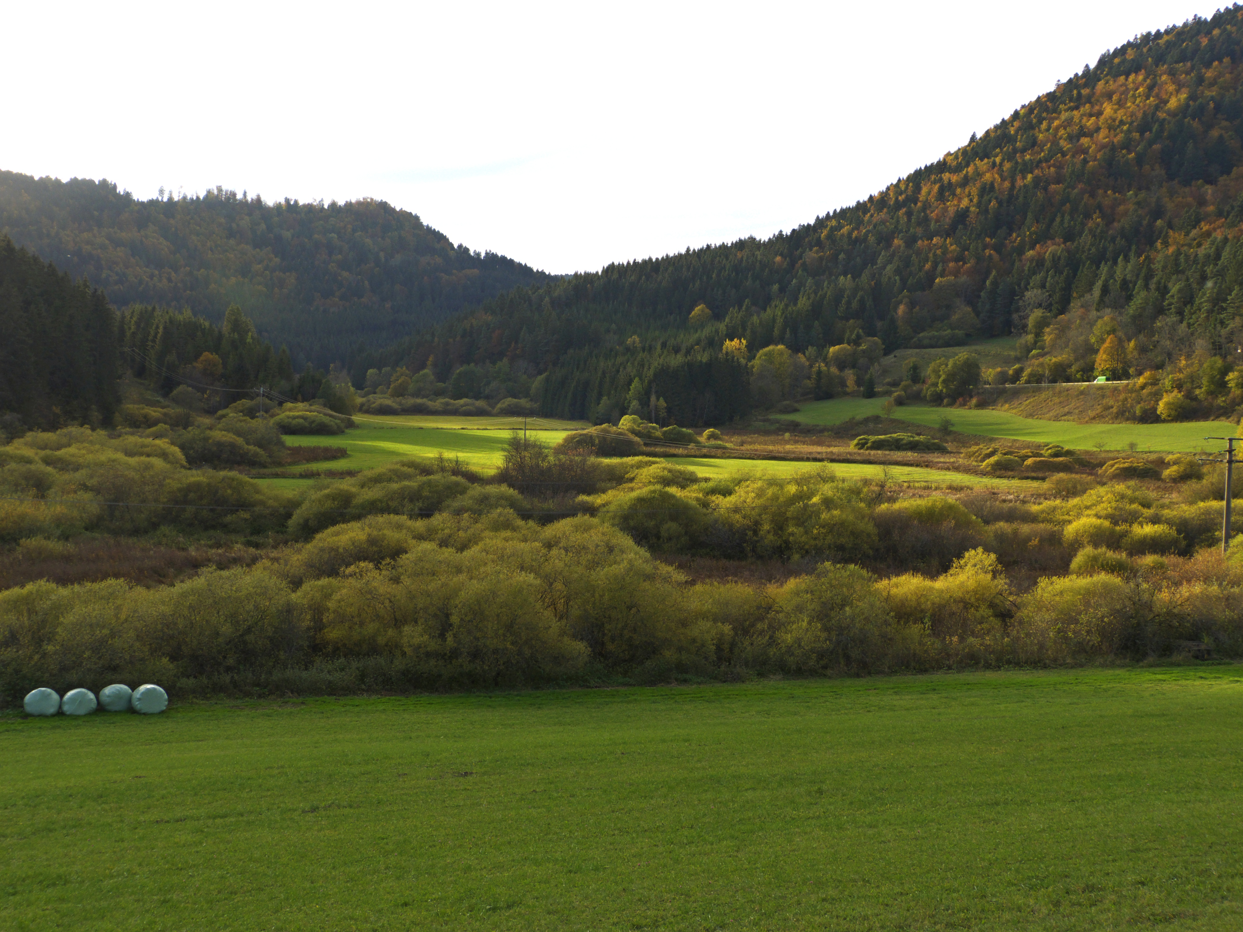 Bära Valley